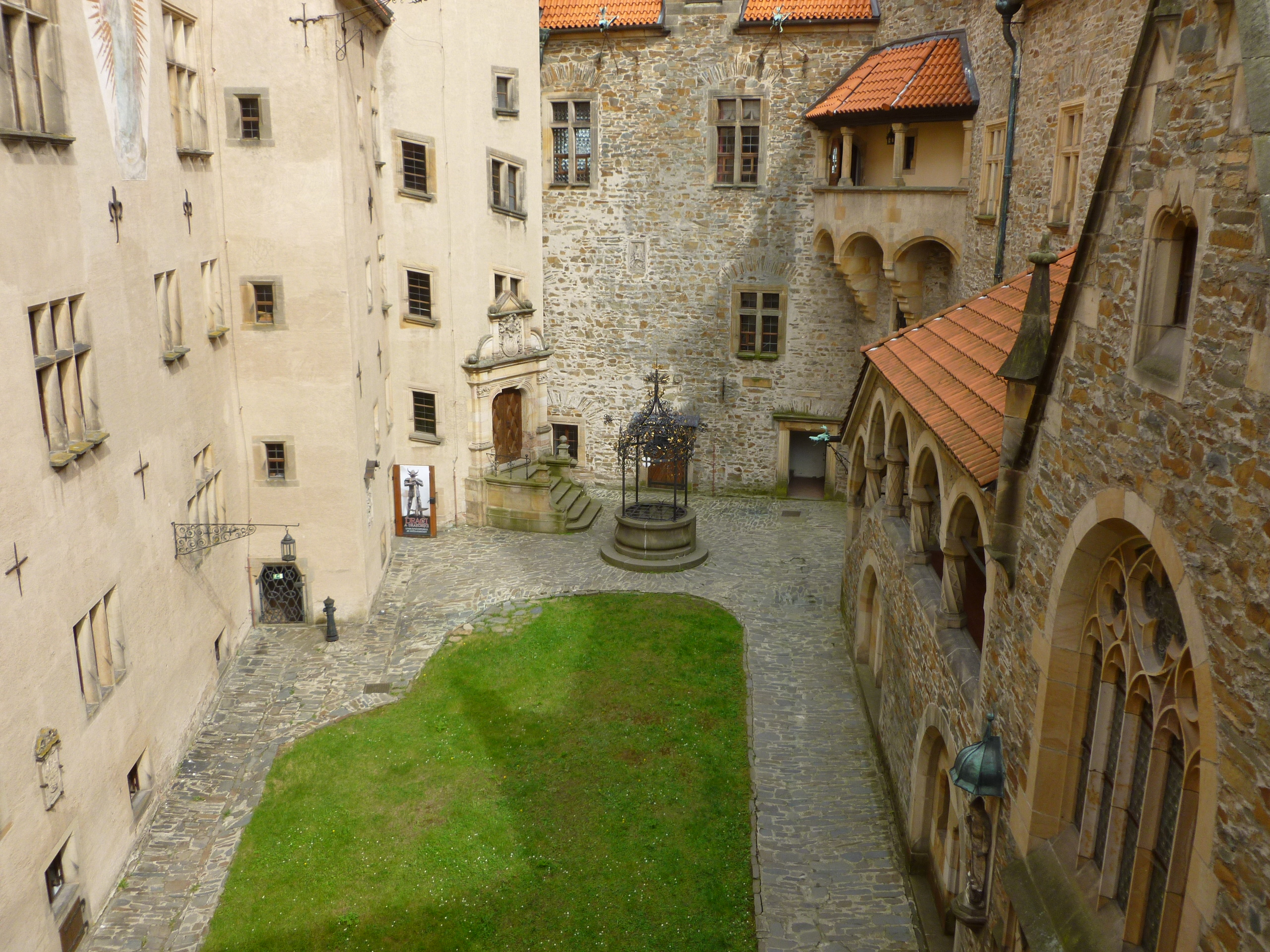 Hrad Bouzov (Bouzov), Bouzov 8